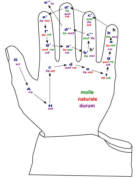 vereinfachte Darstellung der Guidonischen Hand